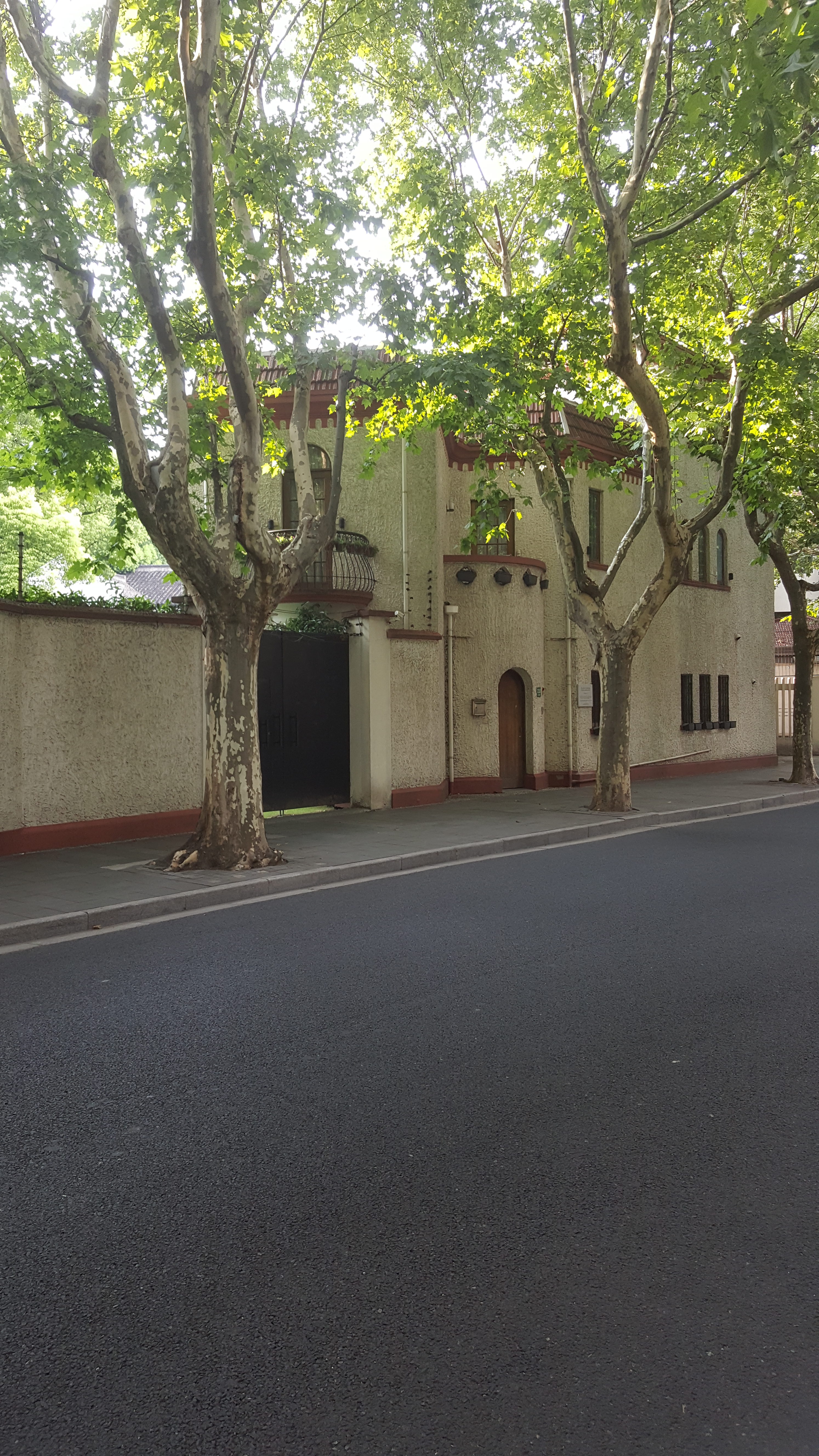 中文（中国大陆）: 武康路210号住宅是上海市第五批优秀历史建筑